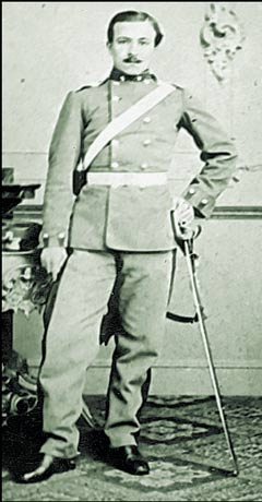 Потпуковник Јеврем Марковић извор